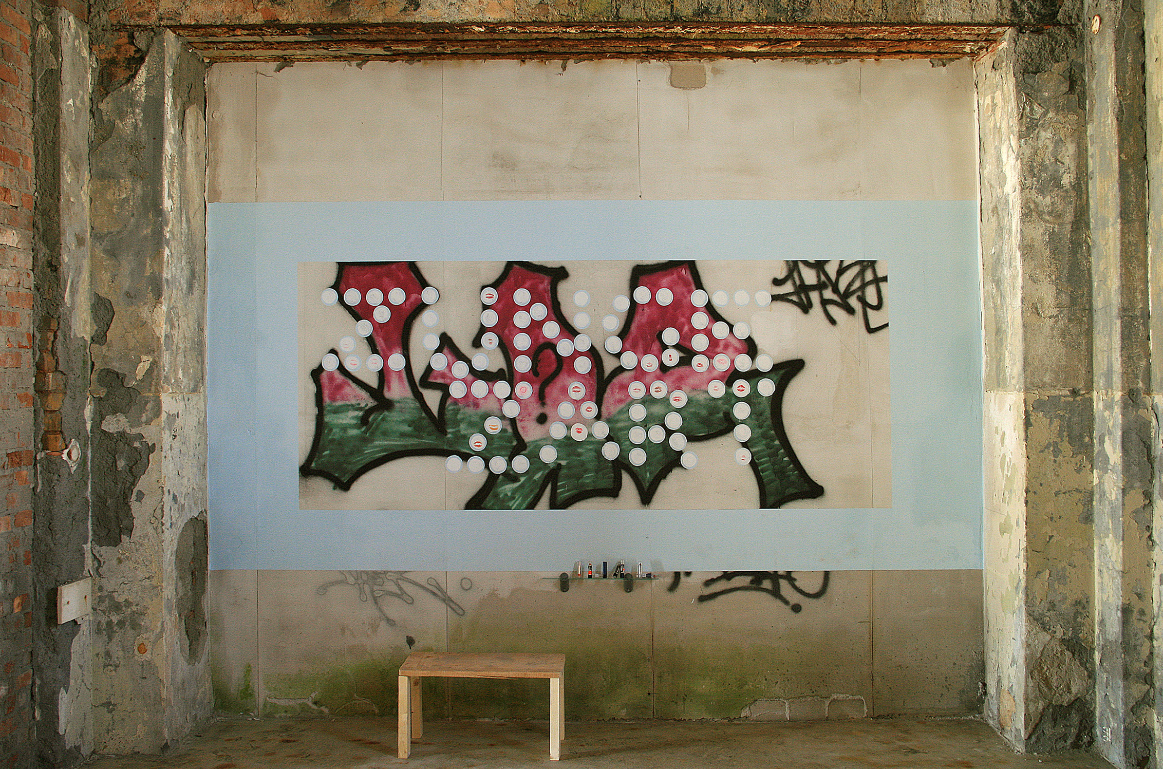 2012 - Globuswerke Leipzig, Wandmalerei und Rauminstallation, Fotografie von Dieter Gerschler